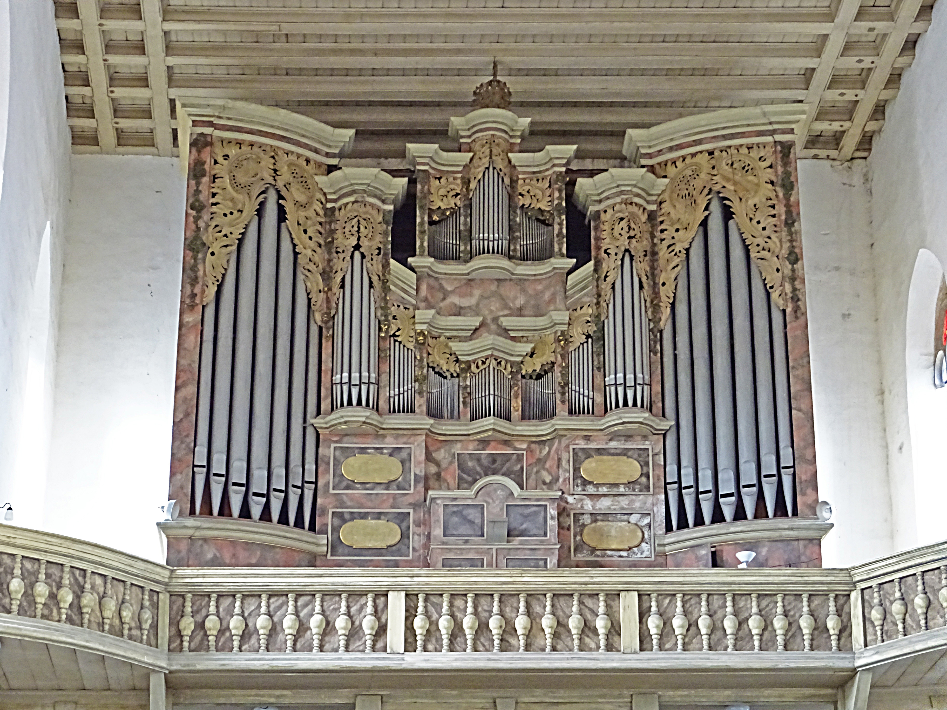 Orgel der Marienkirche in Laucha an der Unstrut vom Orgelbaumeister Eifert aus Stadtilm von 1888